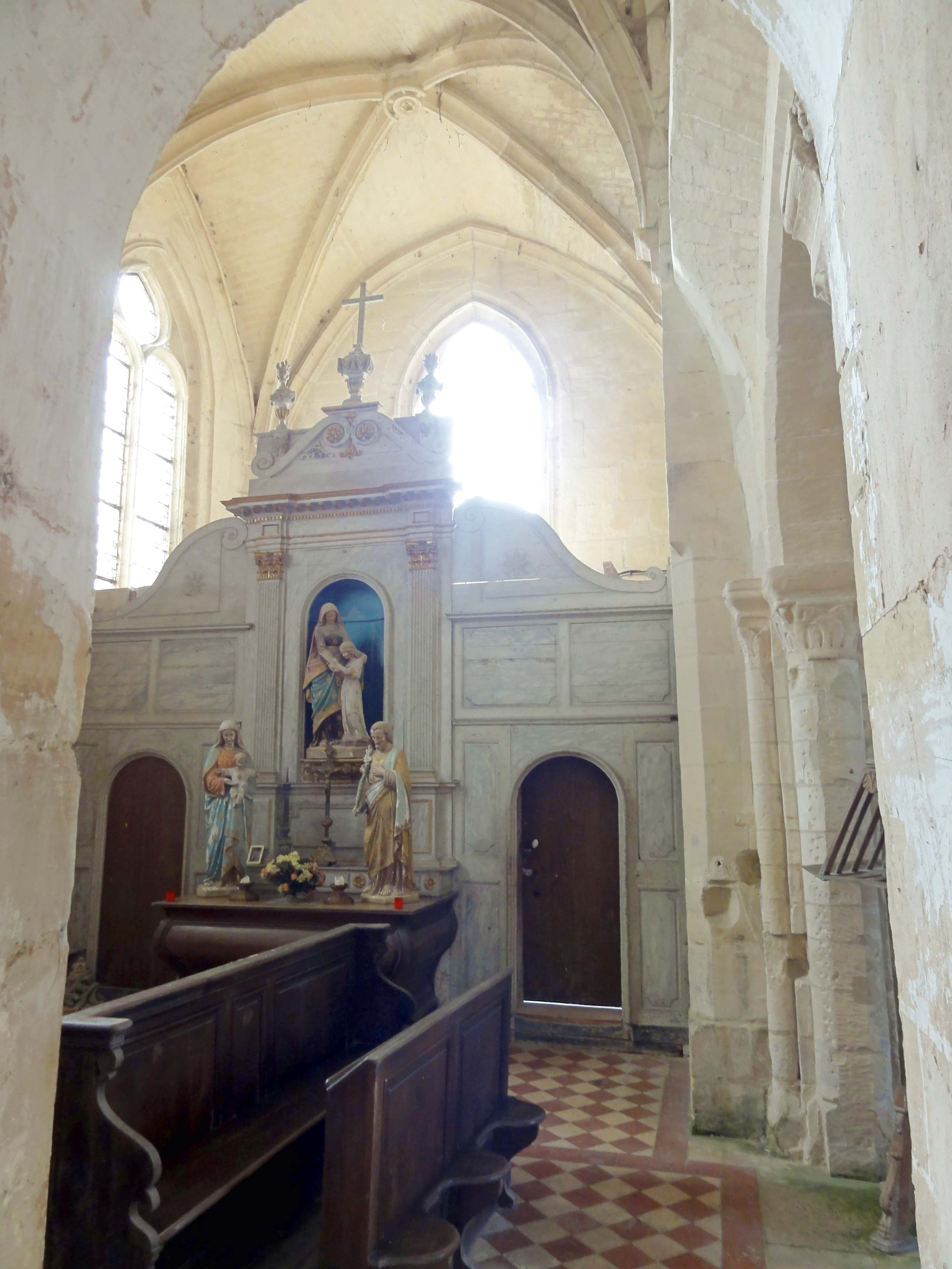 Intérieur de l'église (voir titre).